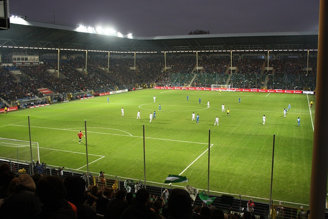 TSG Hoffenheim - VfL Wolfsburg (3:2) 15.11.08 Carl Benz Stadion Mannheim